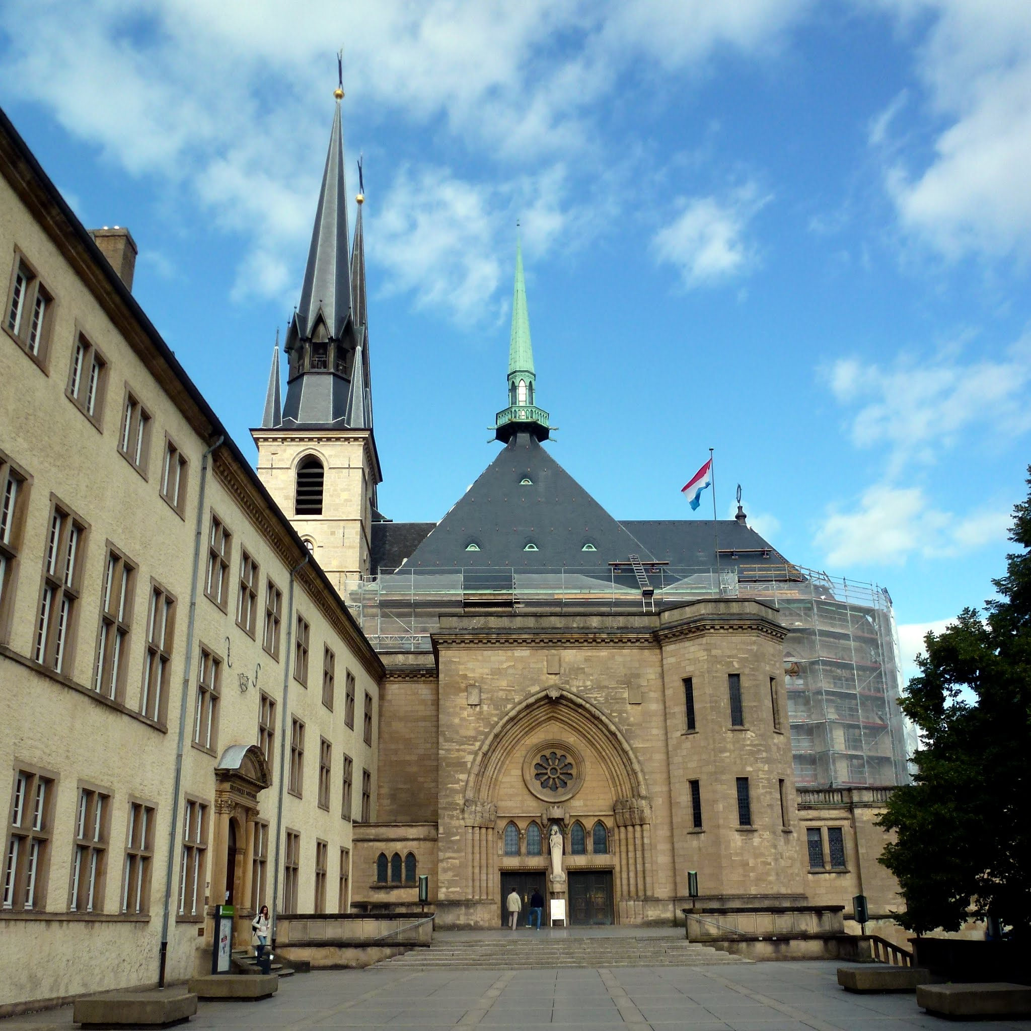 Luxembourg